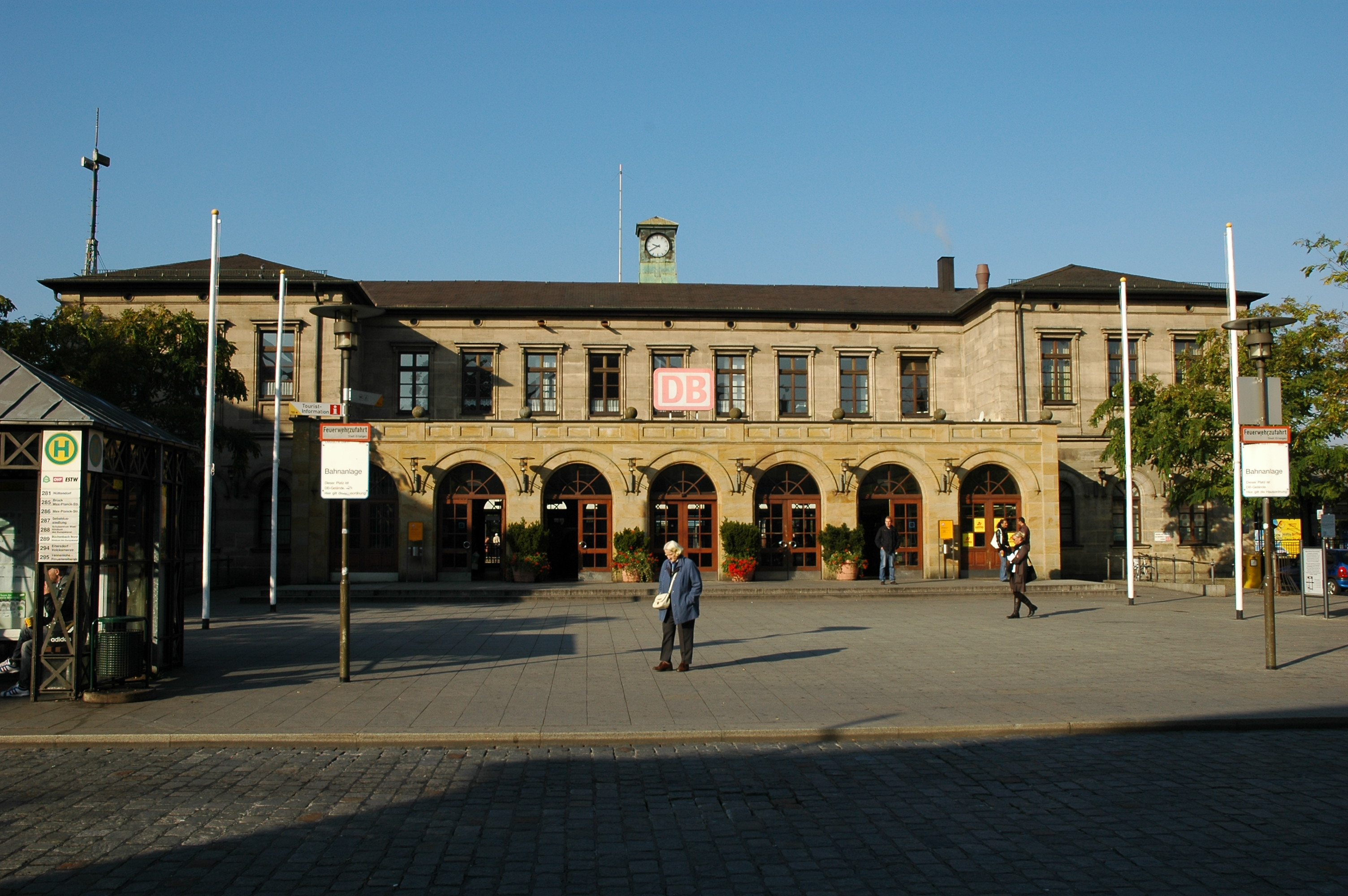 Bahnhof Erlangen vom Bahnhofplatz